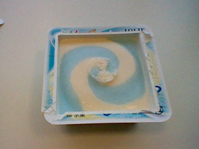 従来通り渦巻き状になっています。